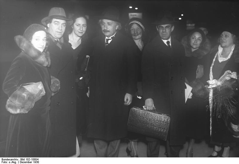 Die Abreise des deutschen Gelehrten Prof. Dr. Albert Einstein nach Amerika! Prof. Einstein bei seiner Abfahrt auf dem Bahnhof Zoo nach Antwerpen, wo er sich nach Amerika einschiffen wird. (Links im Bilde) seine Tochter Margot mit ihrem Gatten Dr. Dimitri Marianoff. (Ganz rechts) Frau Prof. Einstein.